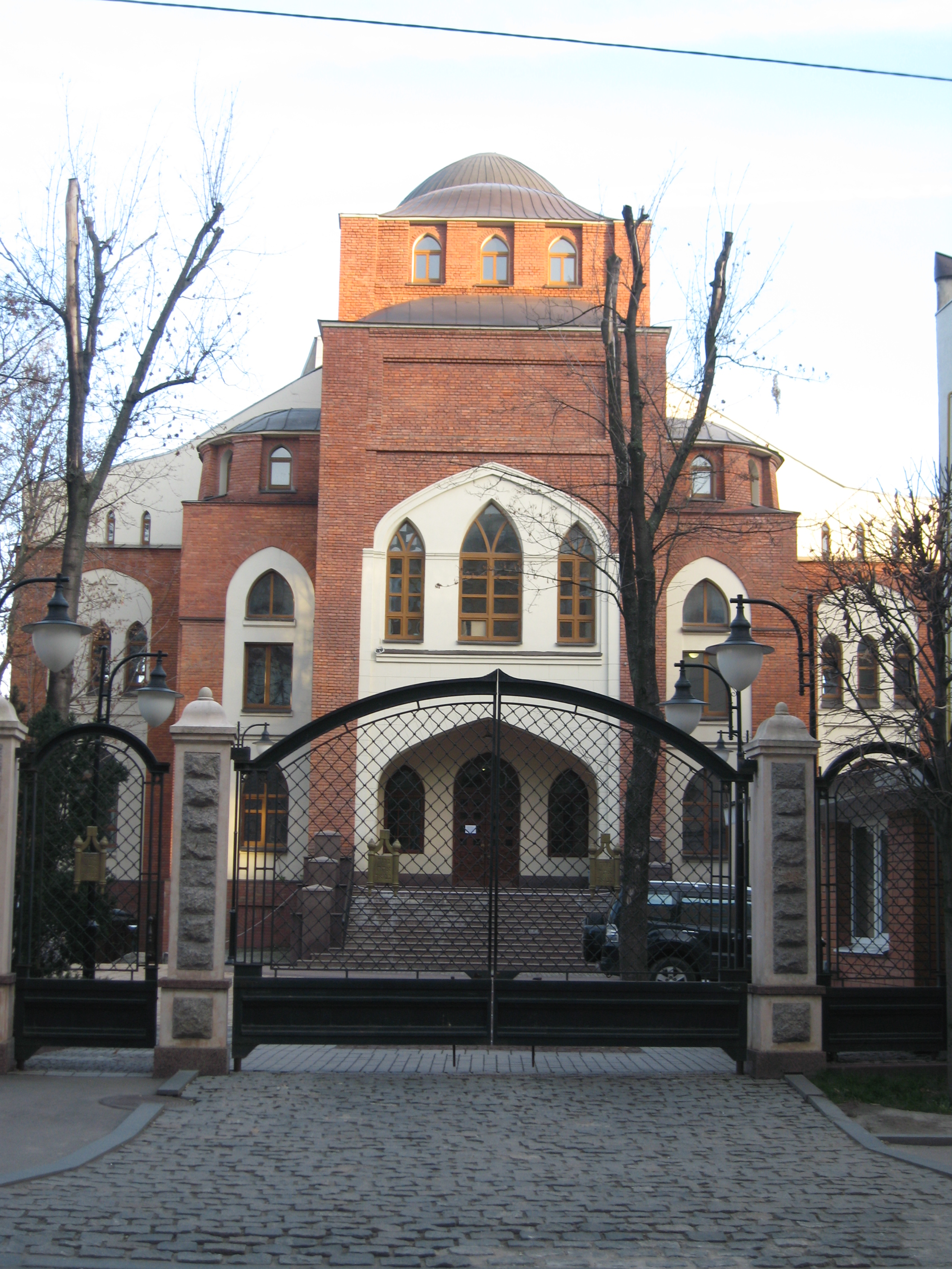 Харківська хоральна Синагога, Харків, вул. Пушкінська, 12 (кол. Німецька).